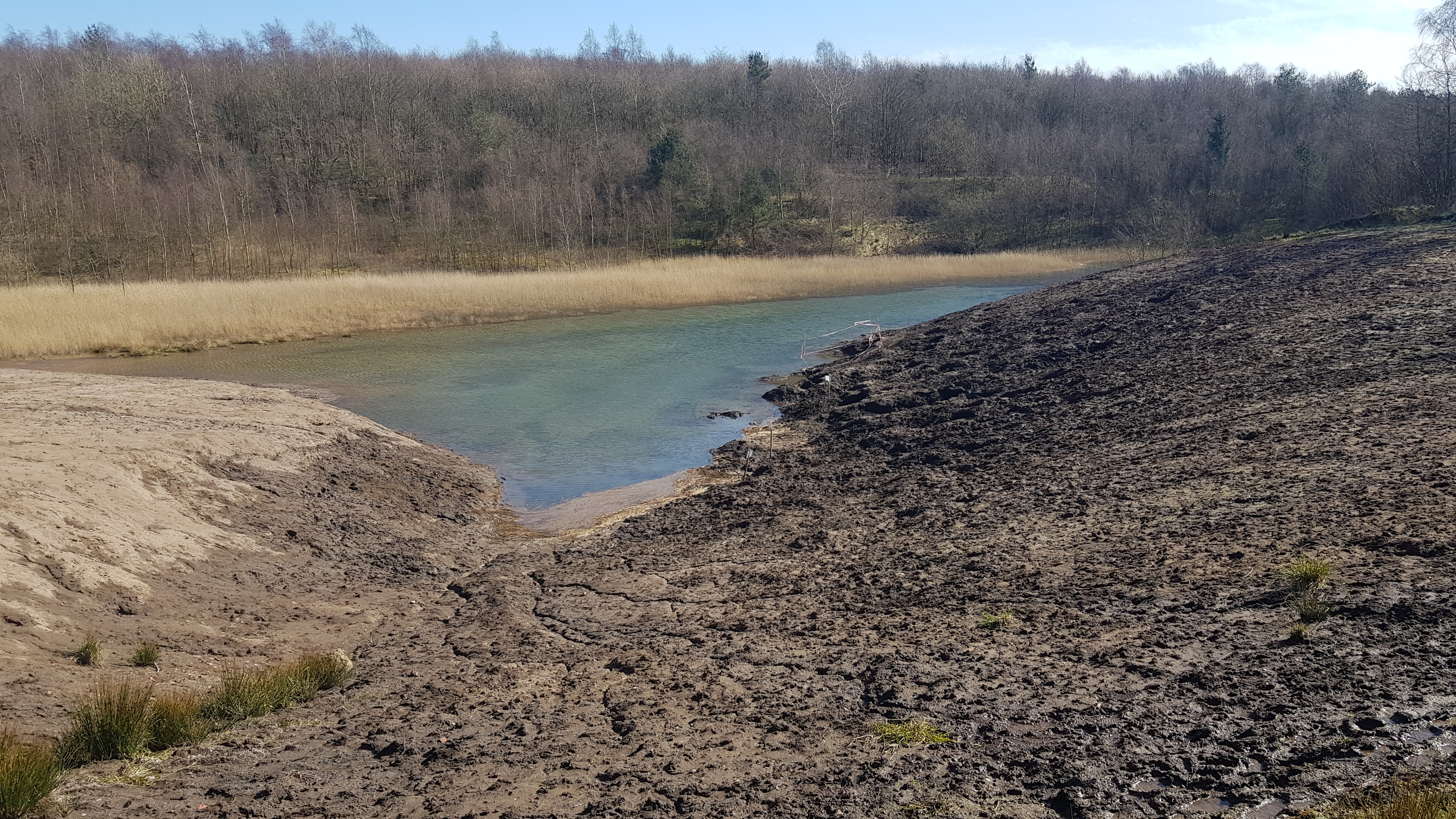 Gram Lergrav